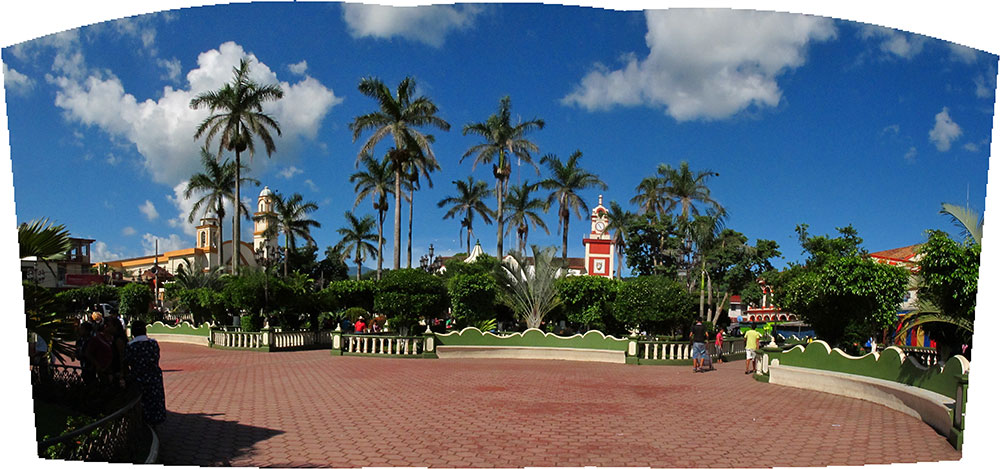 Panoramica en el parque (plaza) — en Santiago Tuxtla, Veracruz, México.